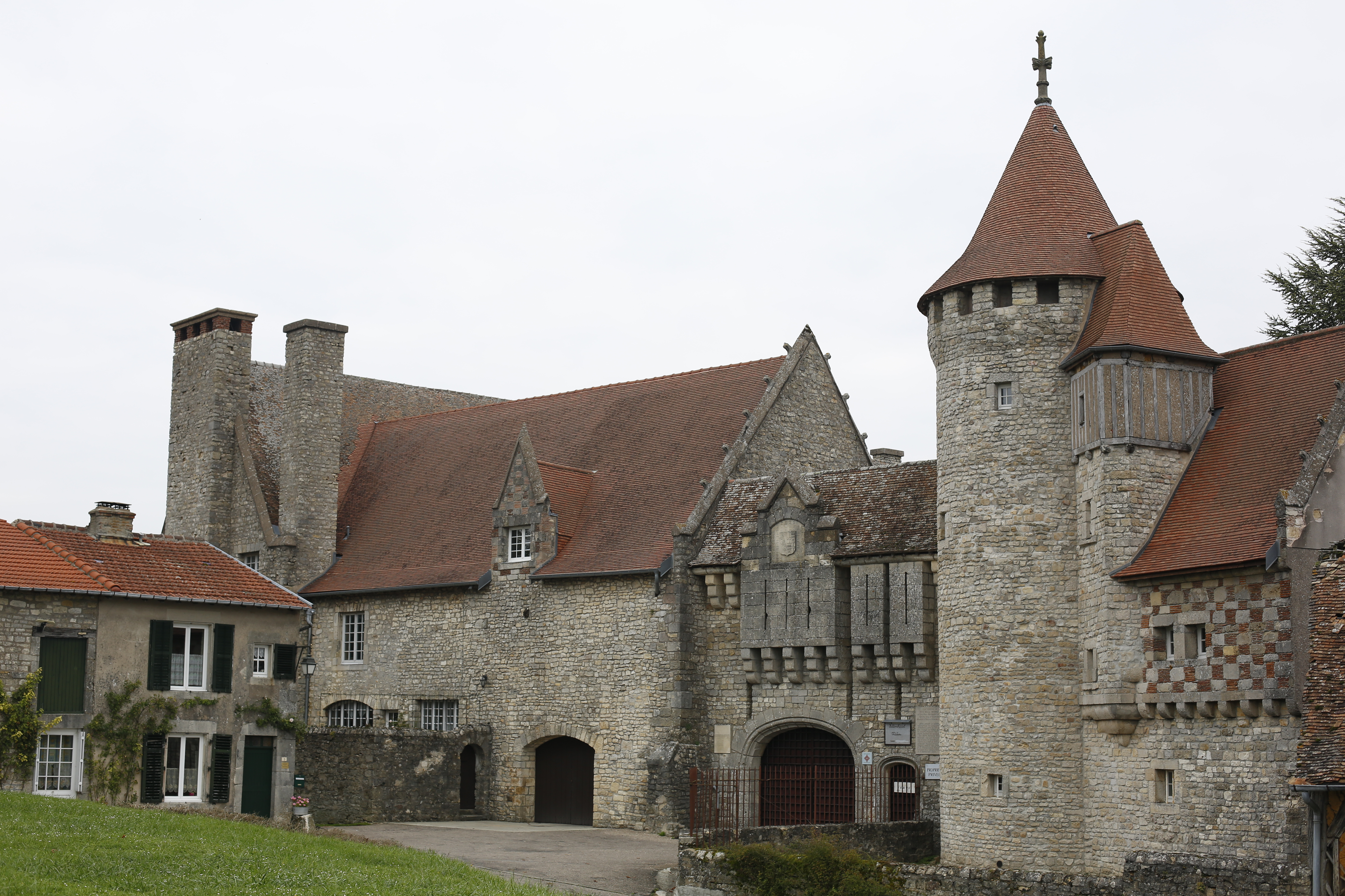 Château d'Hattonchâtel.